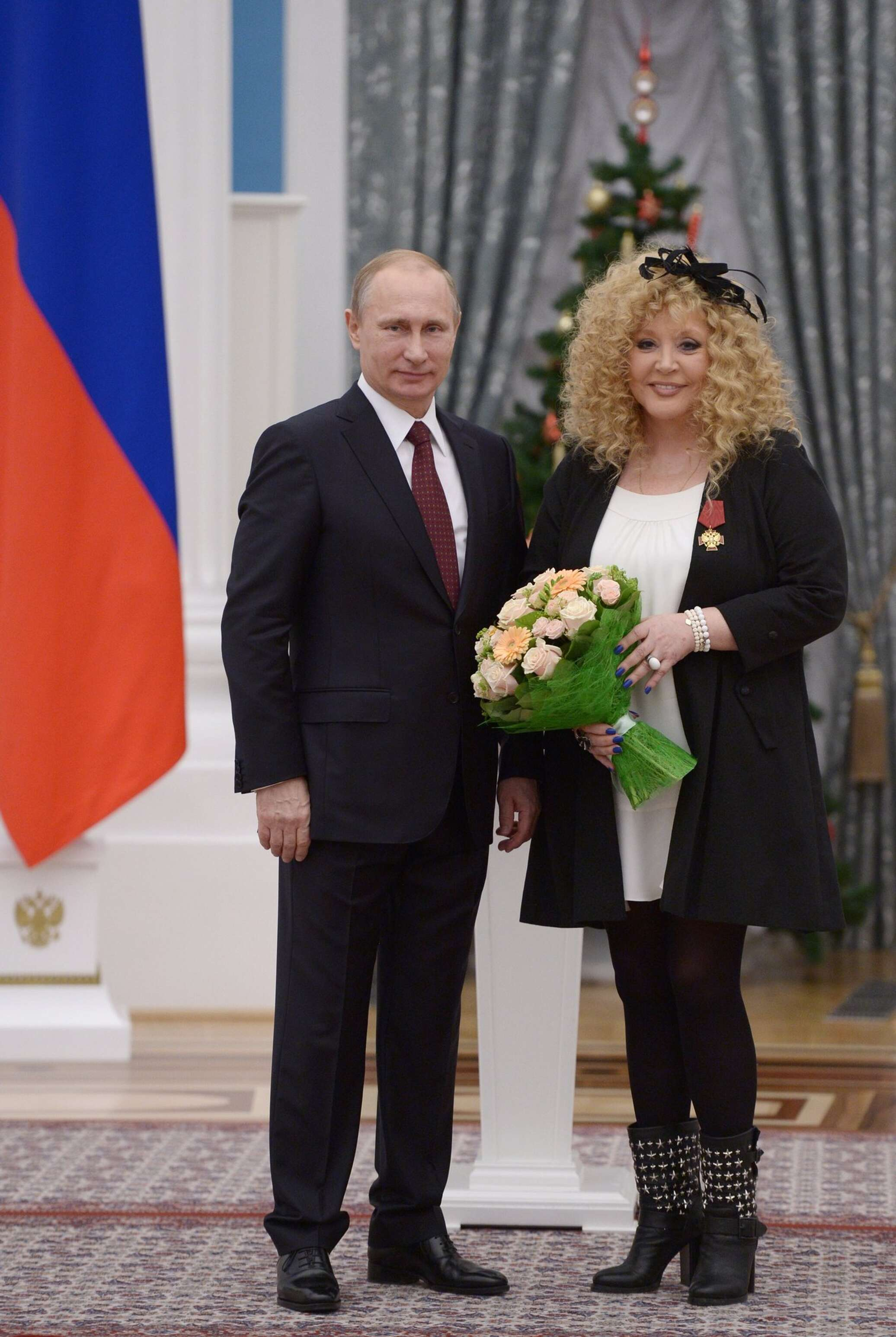 Награждение А.Б. Пугачёвой ОРДЕНОМ «ЗА ЗАСЛУГИ ПЕРЕД ОТЕЧЕСТВОМ» IV СТЕПЕНИ. Церемония вручения государственных наград Российской Федерации. 22 декабря 2014 года